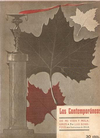 Portada de De mi vida y milagros.